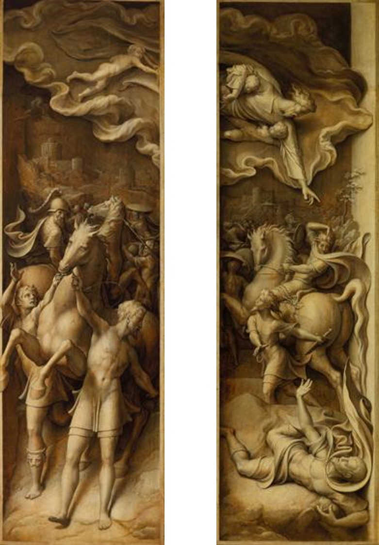 Conversão de São Paulo, volantes do tríptico da Descida da Cruz (c. 1540-1545) de Pieter Coecke van Aelst no Museu Nacional de Arte Antiga, Lisboa, Portugal.